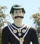 Amaragadhi killa in Dadeldhura Nepal .